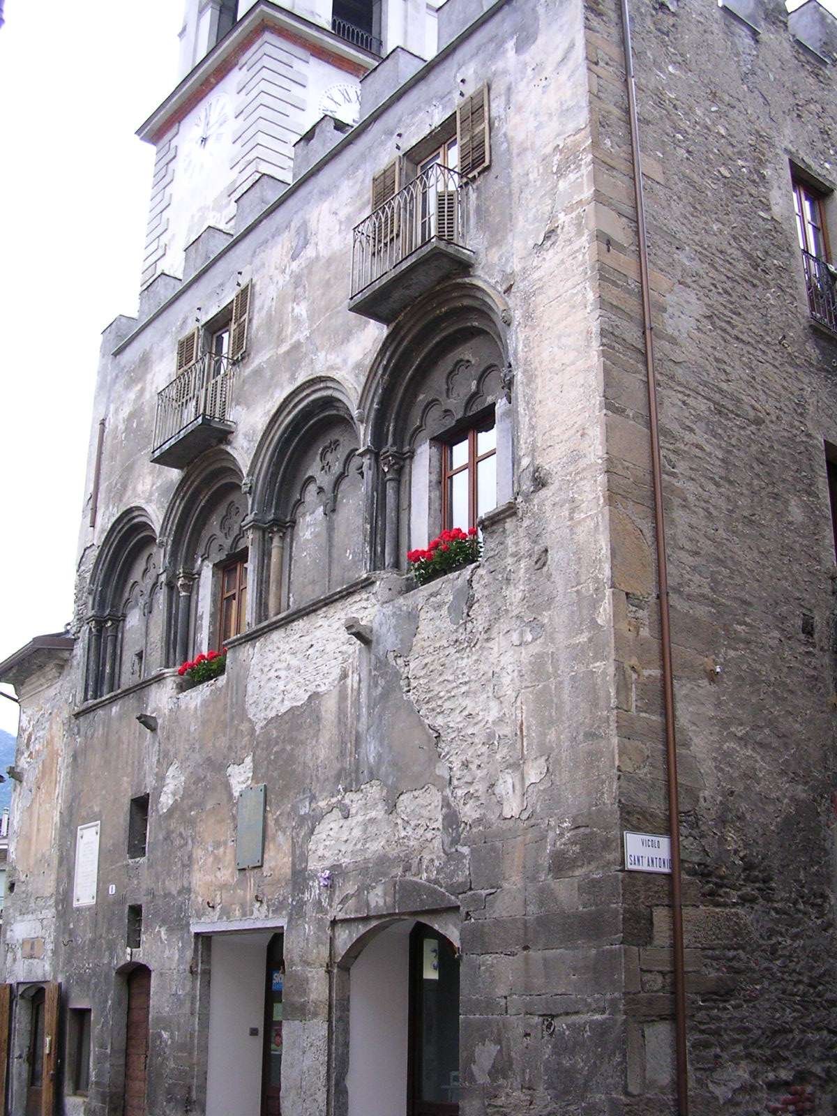 Casa natale del cardinale Enrico da Susa. Rilascio questa foto scattata da me con la seguente licenza libera